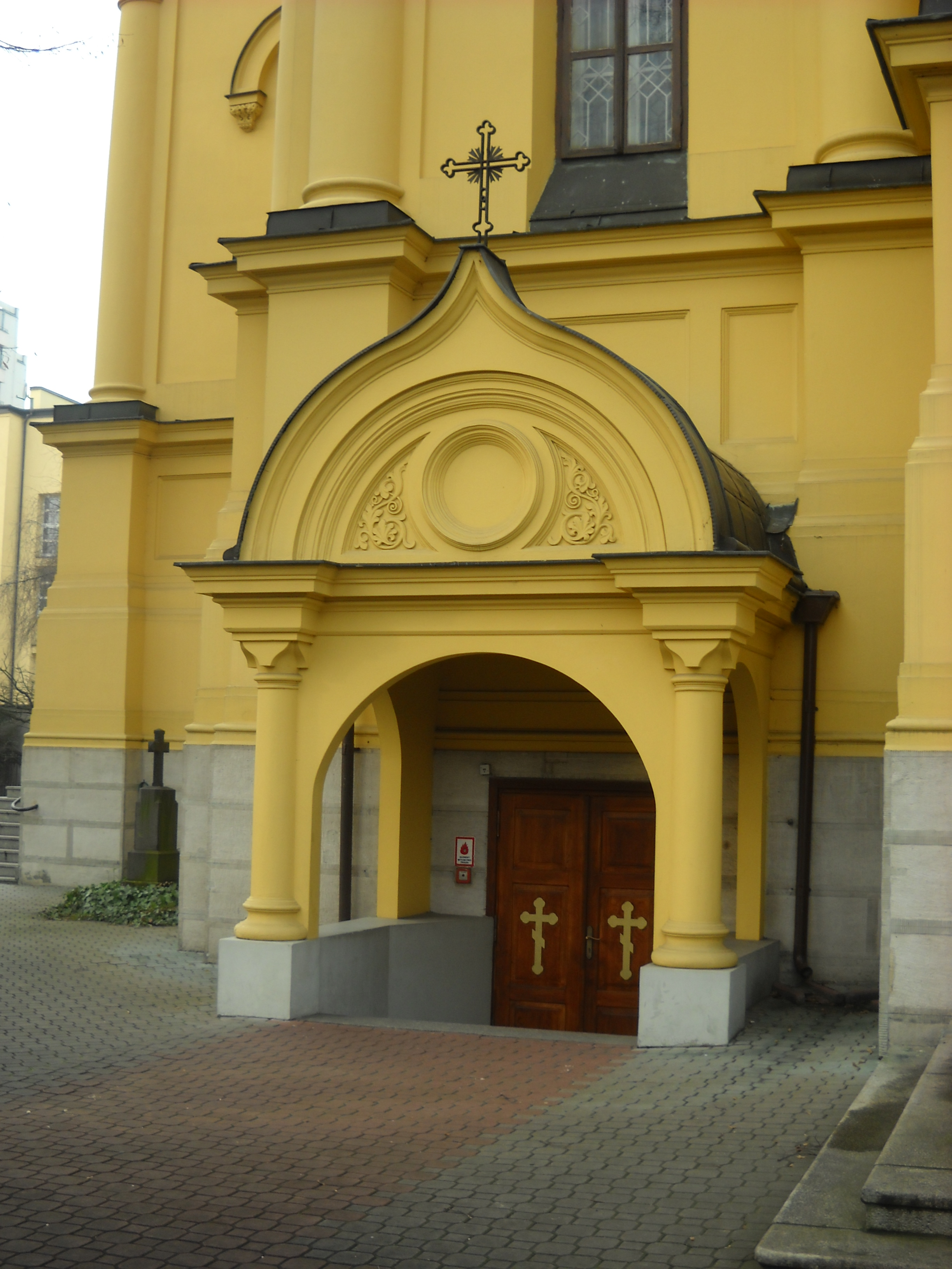 Wejście do kaplicy dolnej soboru św. Marii Magdaleny w Warszawie